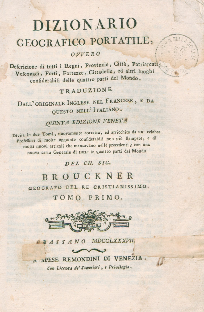 Frontespizio